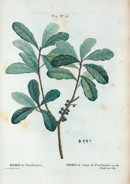 Myrica Pensilvanica = Myrica Cirier de Pensilvanie.